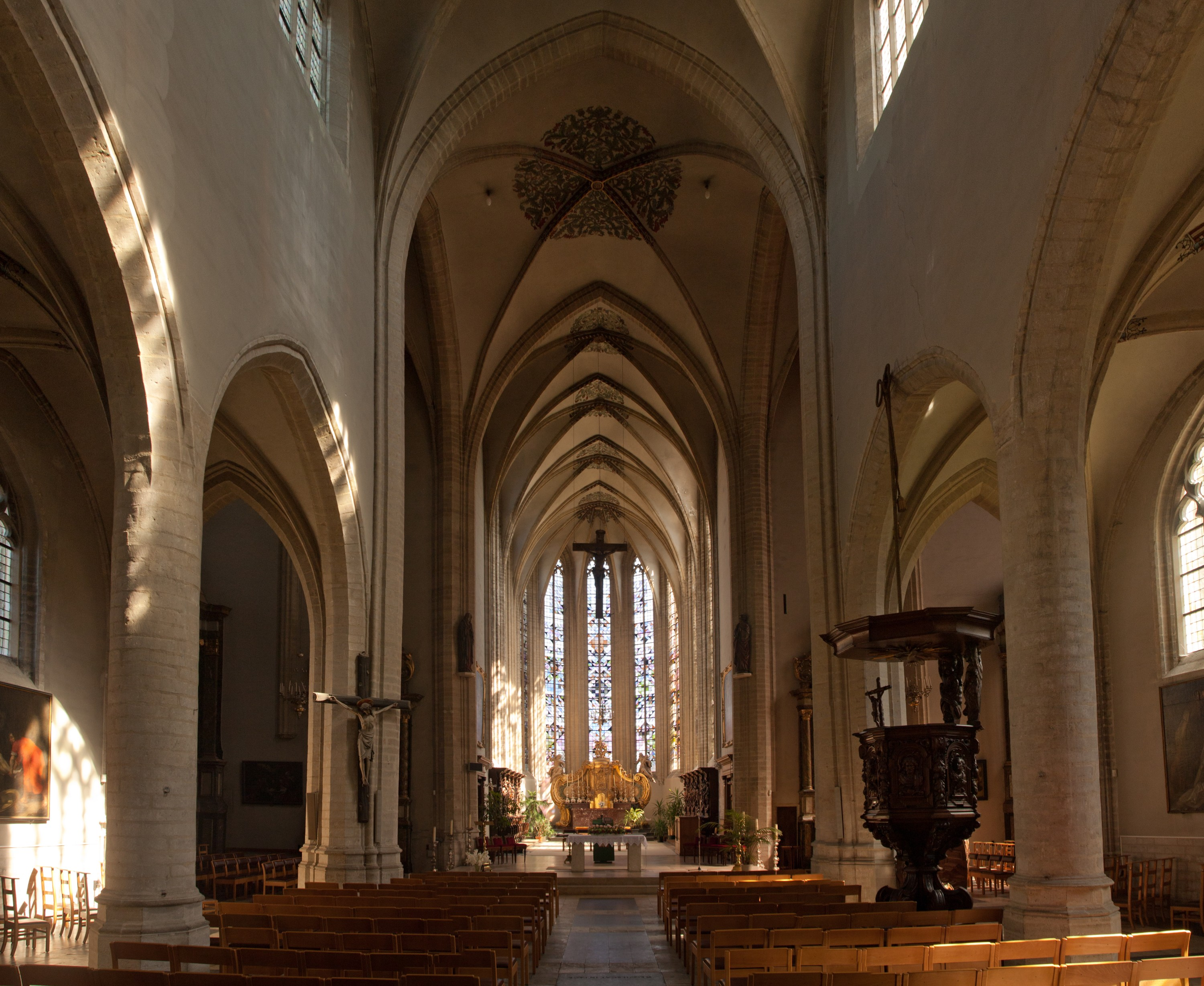 Interieur van de Sint Kwintenskerk te Leuven